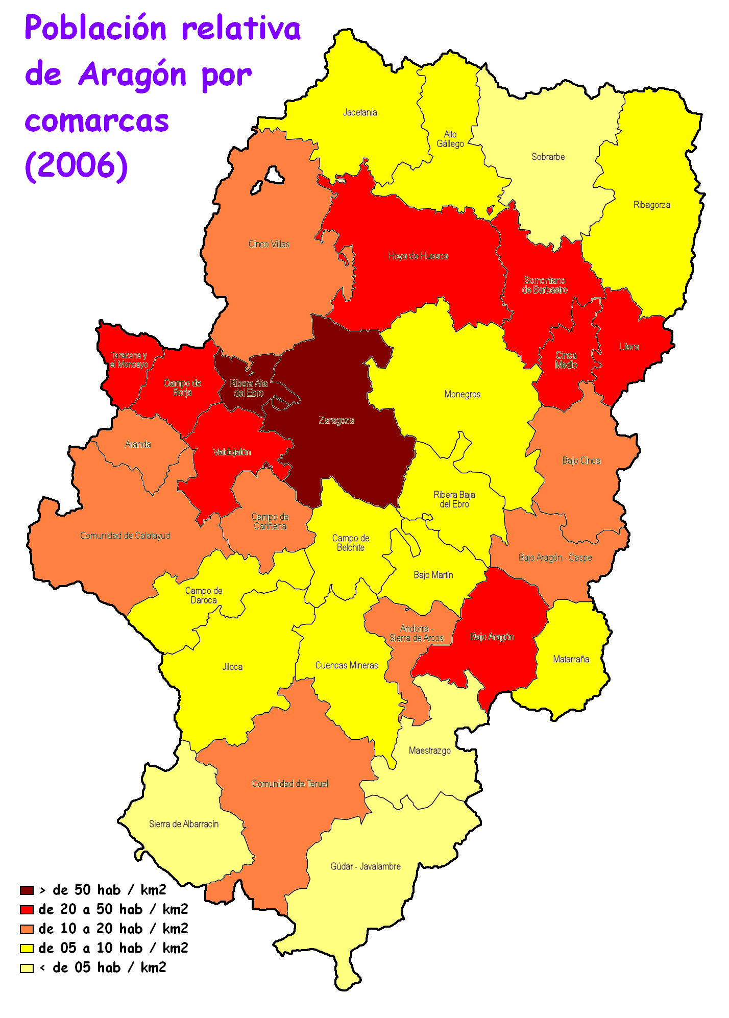 Población relativa de Aragón por comarcas (2006)